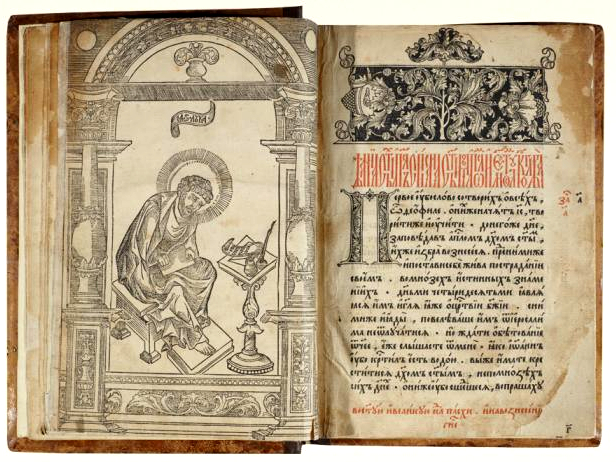 АПОСТОЛ Москва, печатники Иван Федоров, Петр Тимофеев Мстиславец 1 марта 1564 года 68 л. Бумага; печать; переплет – дерево, кожа; тиснение 28 х 19,5; разворот – 43 Поступил в 1861 году из библиотеки купца И.П. Каратаева РНБ инв. I. 1.17б, инв. 44